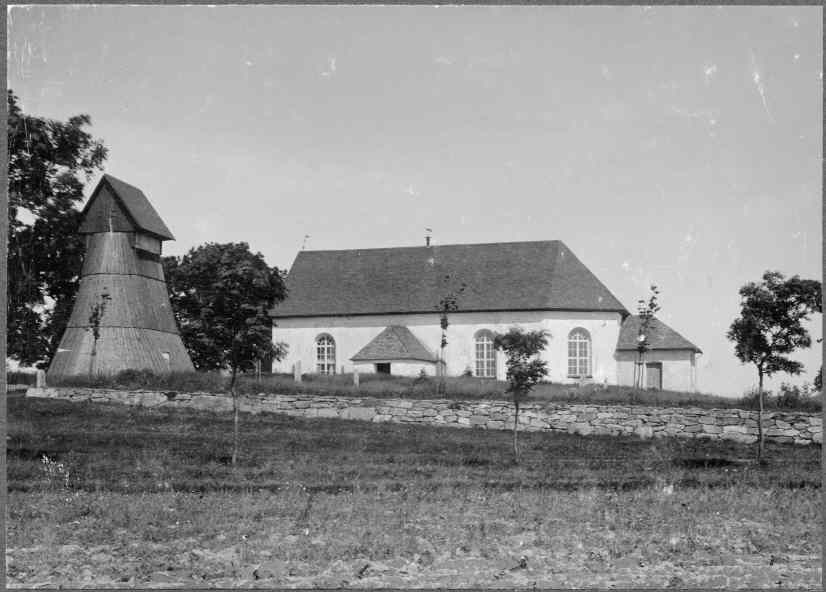 Kyrkan från söder. Kategori: (01) ExteriörerKyrkan från söder.